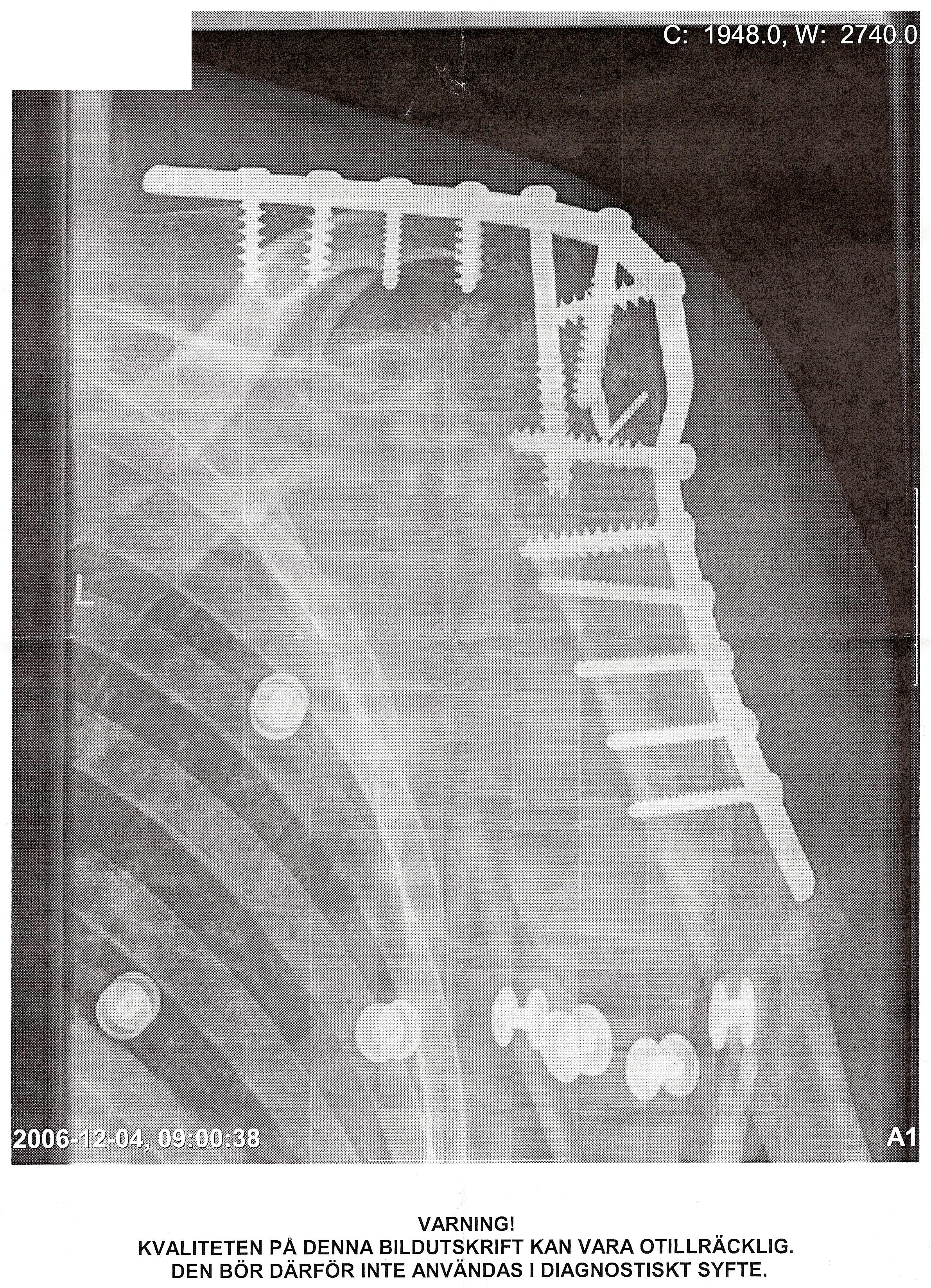 Artrodes nr 2 utförd på Johans axel. Bild tillhör: Johan S 11:28, 4 December 2006 (UTC)